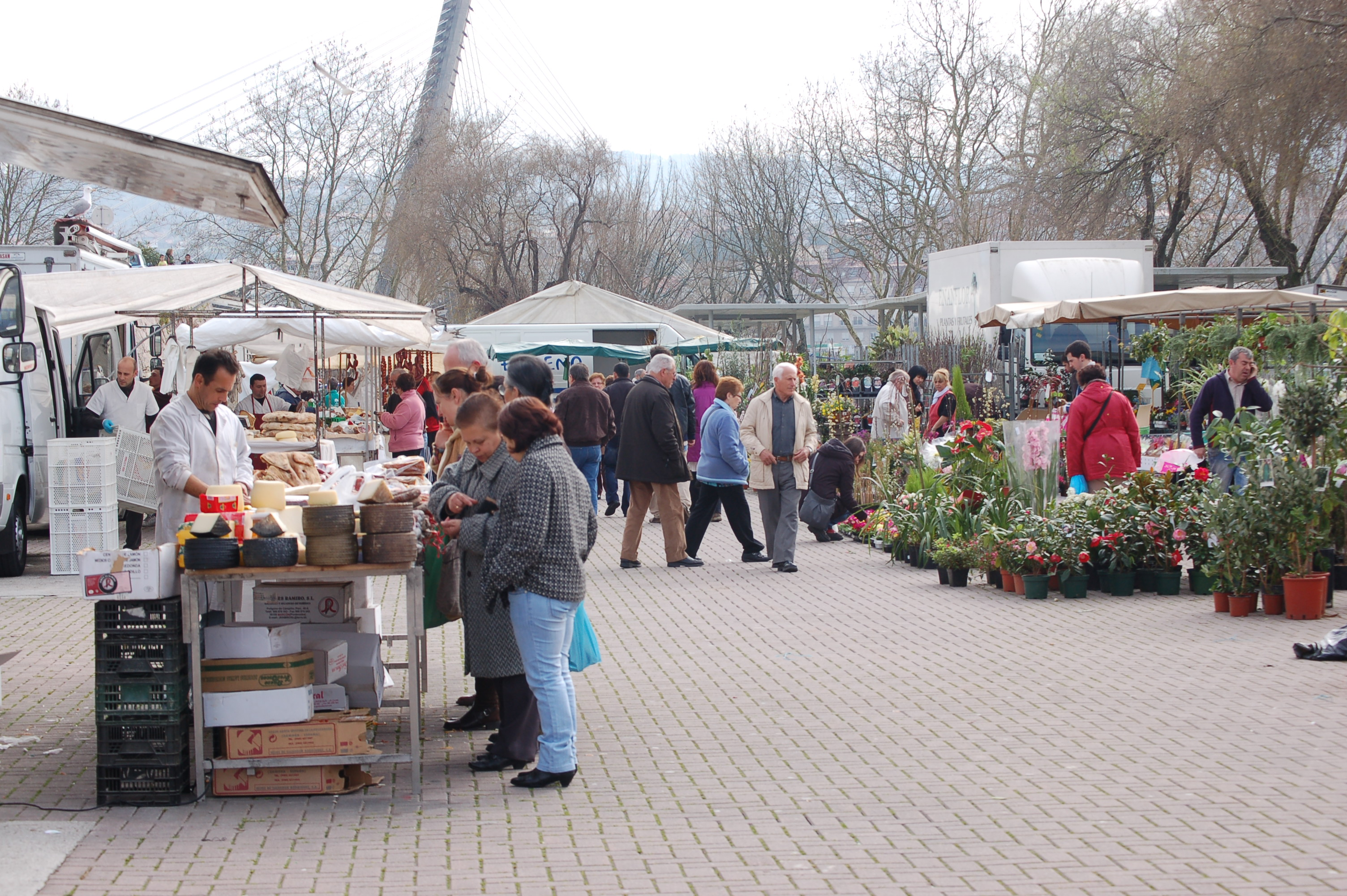 Zona de venda de plantas e alimentos na feira de Pontevedra.